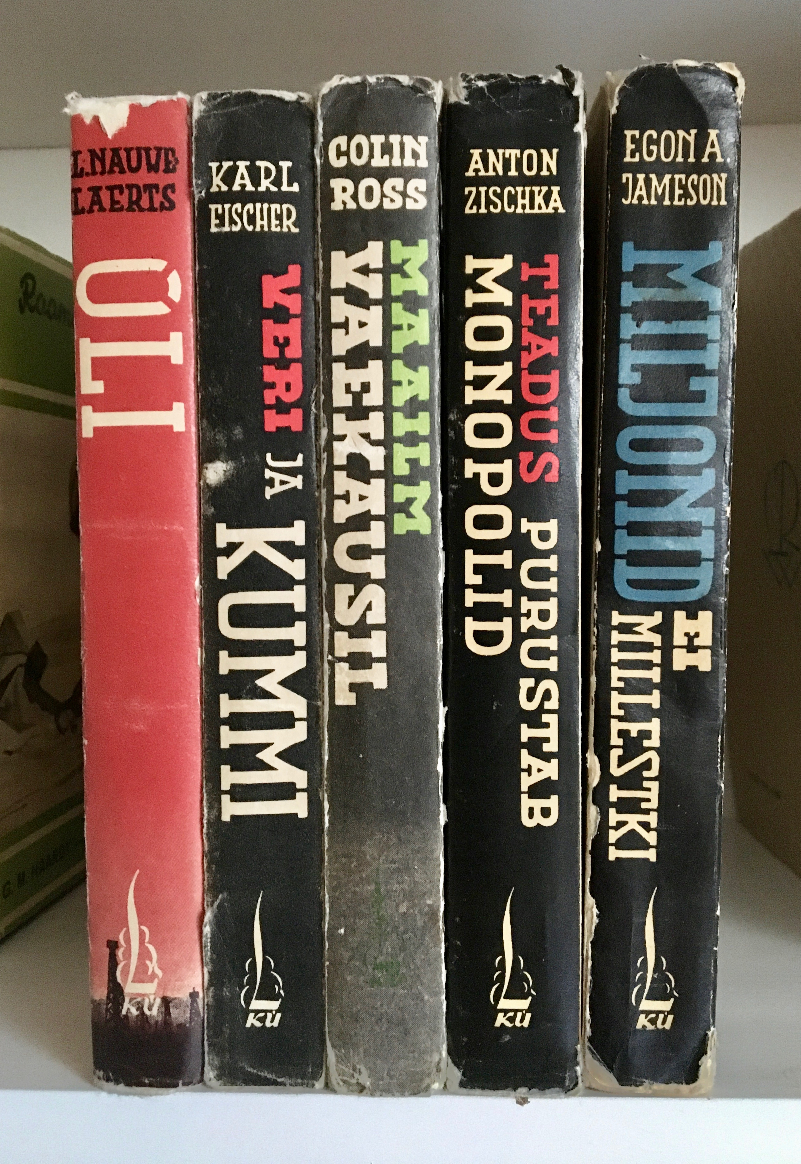 Maailma vaekausil seljad